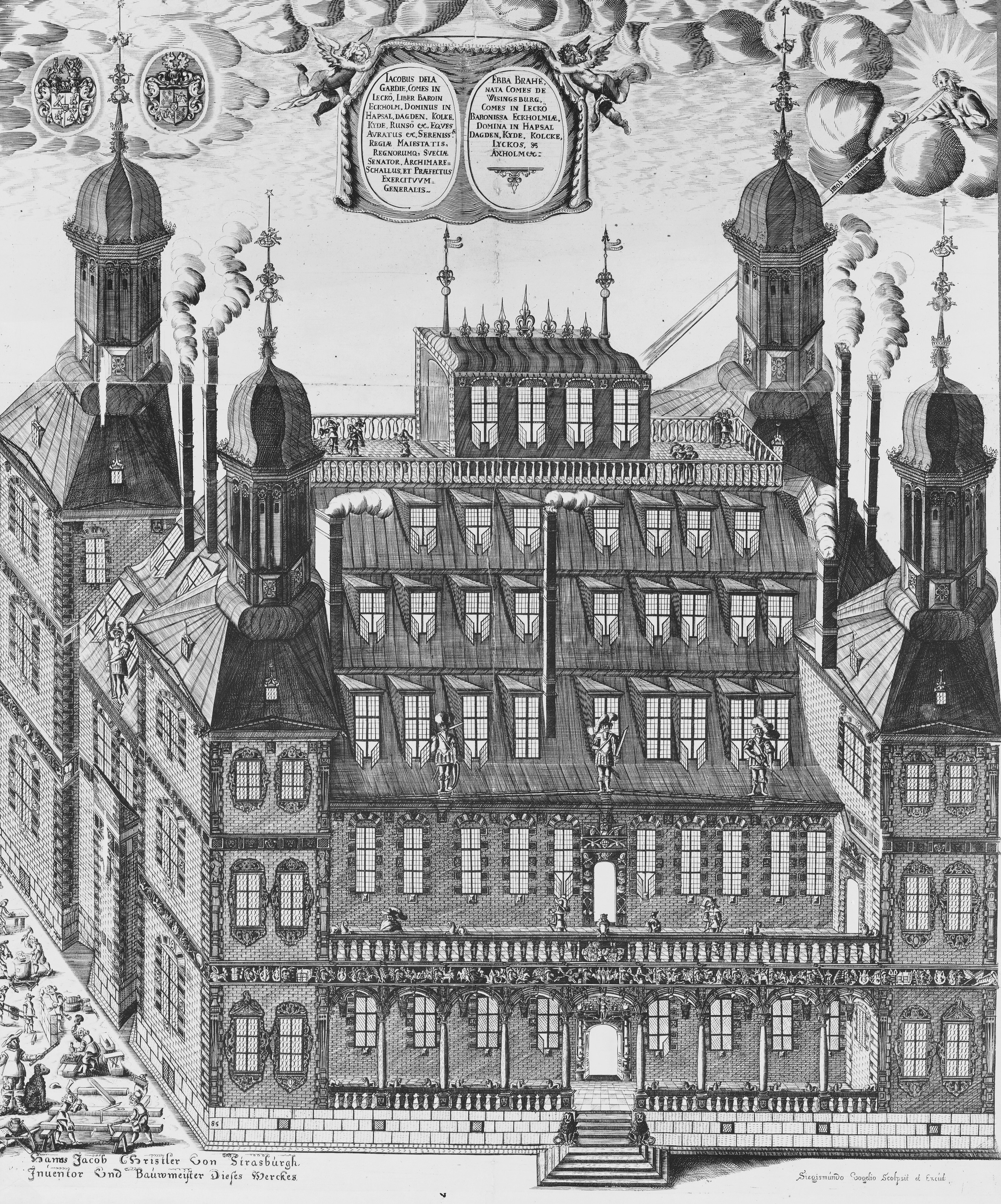 Palatset Makalös, kopparstick av Sigismund von Vogel, ca 1647